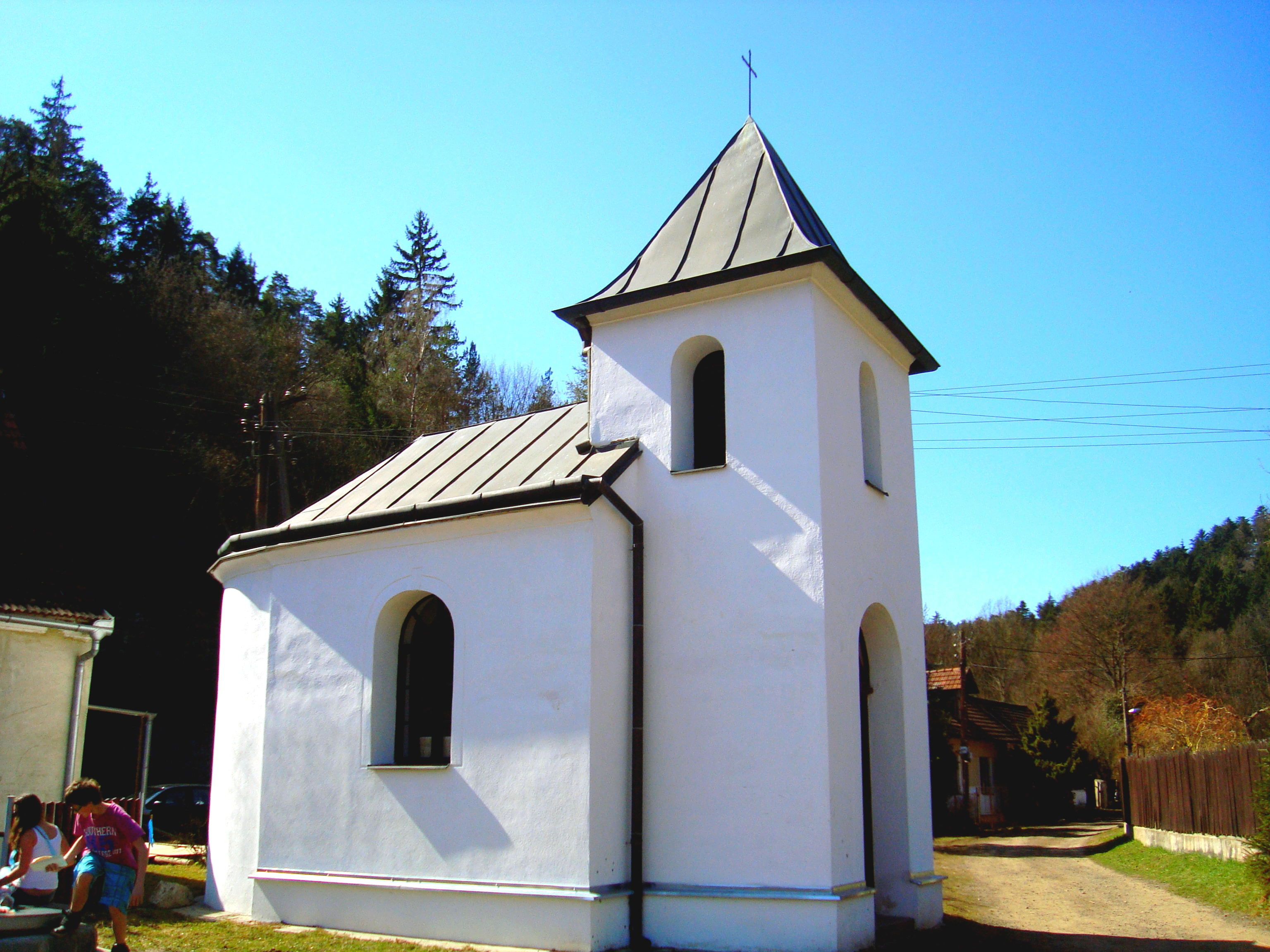 Kaple Panny Marie Bolestné – Šmelcovna